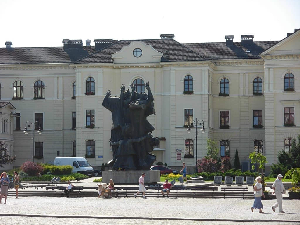 Stary Rynek w Bydgoszczy - pomnik Walki i Męczeństwa na tle ratusza